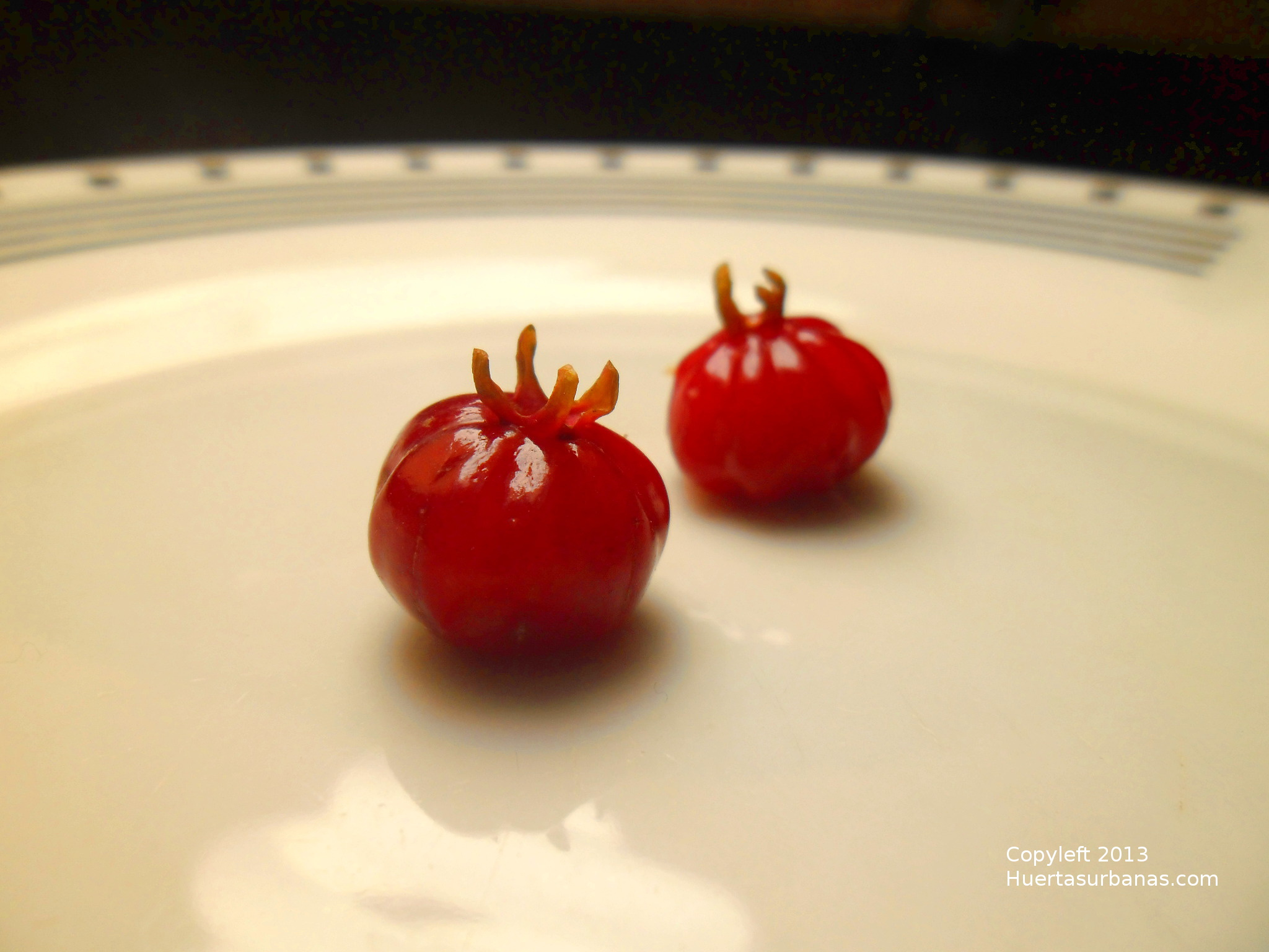 Foto de dos frutos de eugenia uniflora variedad roja, procedentes de Argentina.